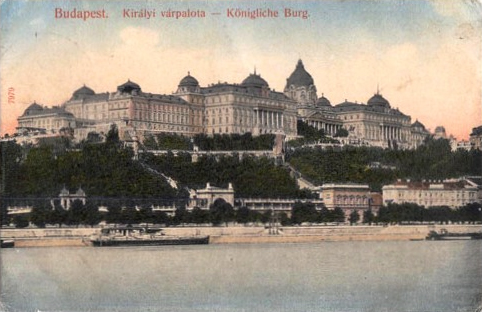 Königliche Burg in Budapest